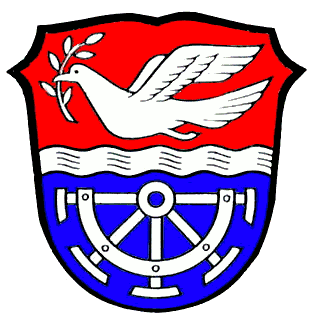 Coat of arms of the Town Rieden (bei Kaufbeuren)